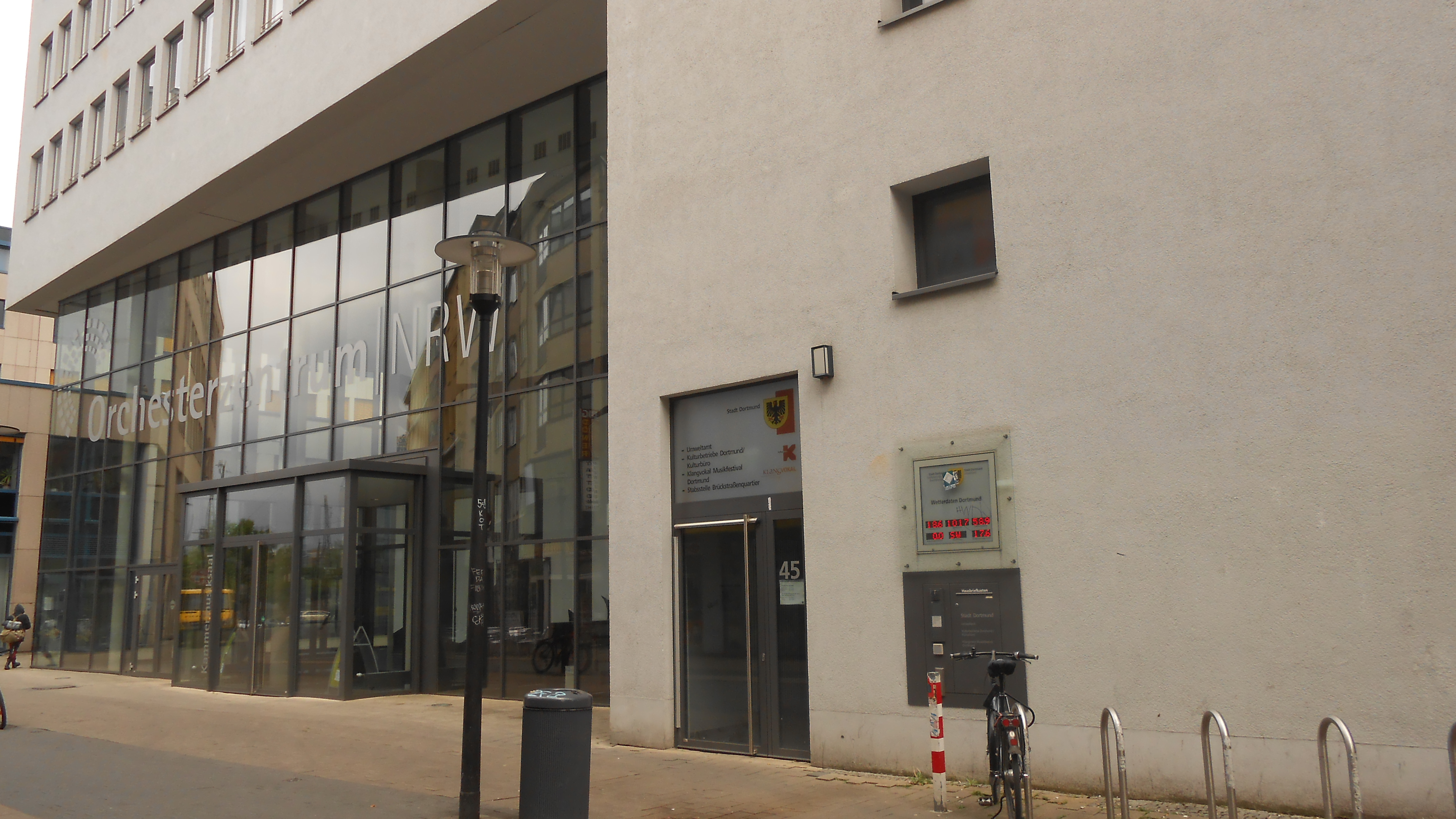 Das Orchesterzentrum NRW in Dortmund, an der Brückstraße.